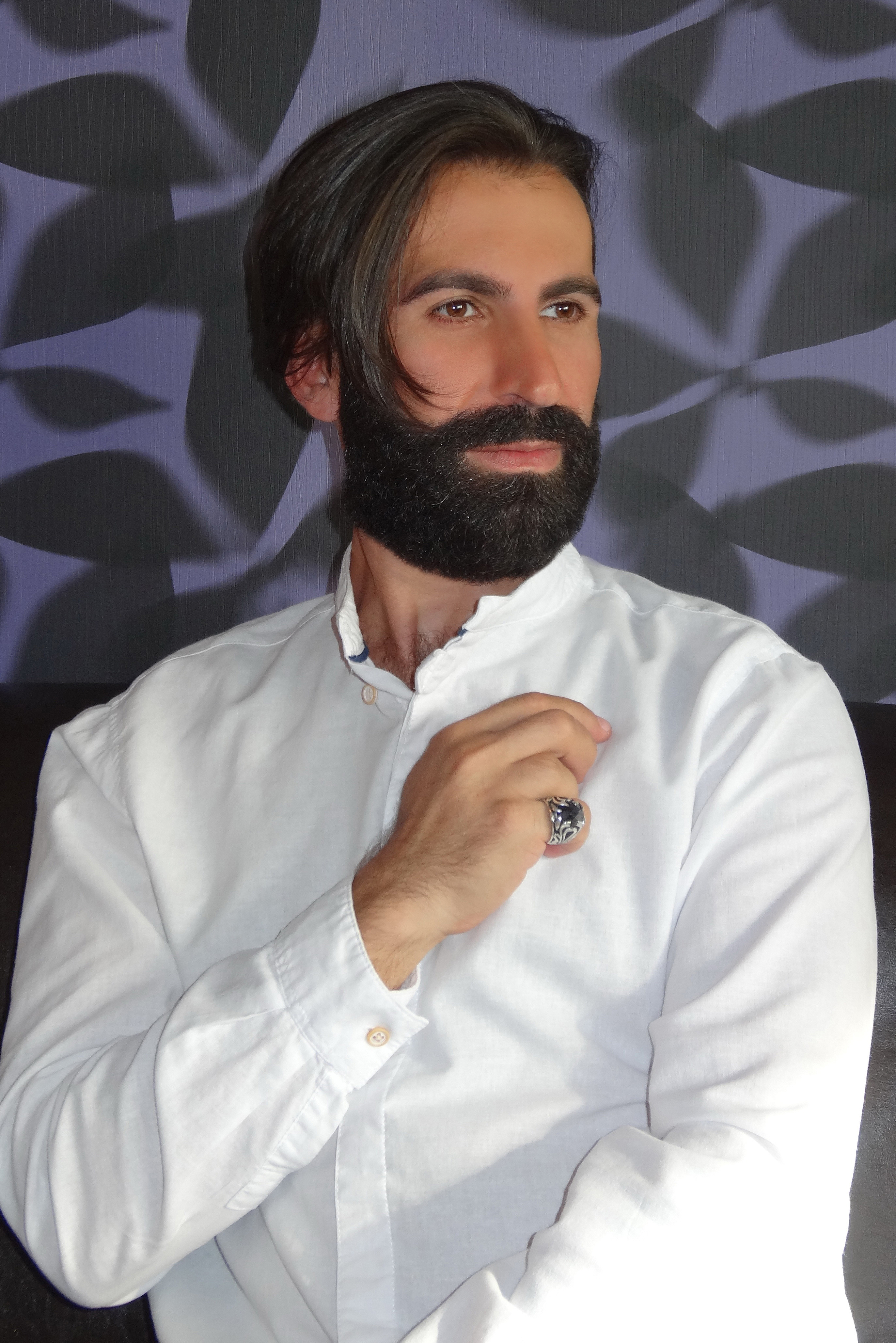 Sar Sargsyan